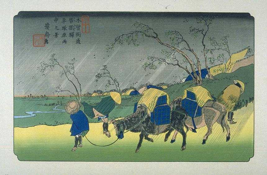 Kutsukake on the Kisokaido, ukiyo-e prints by Keisai Eisen